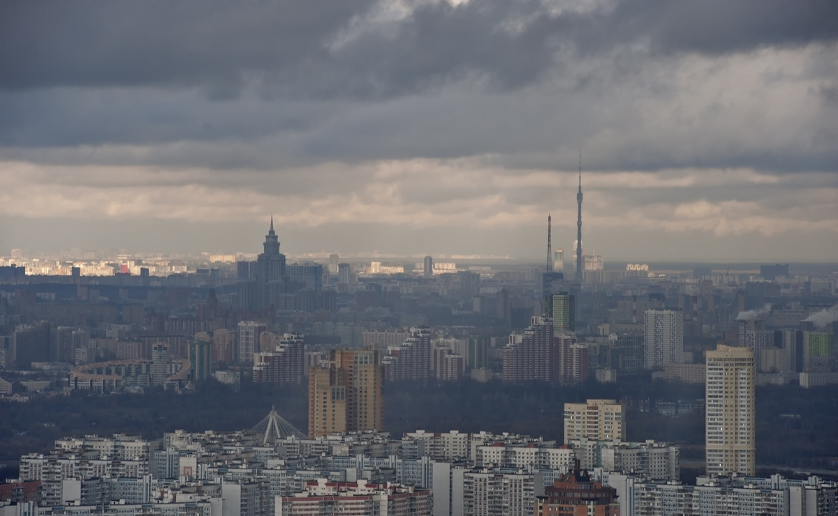 Moscow.